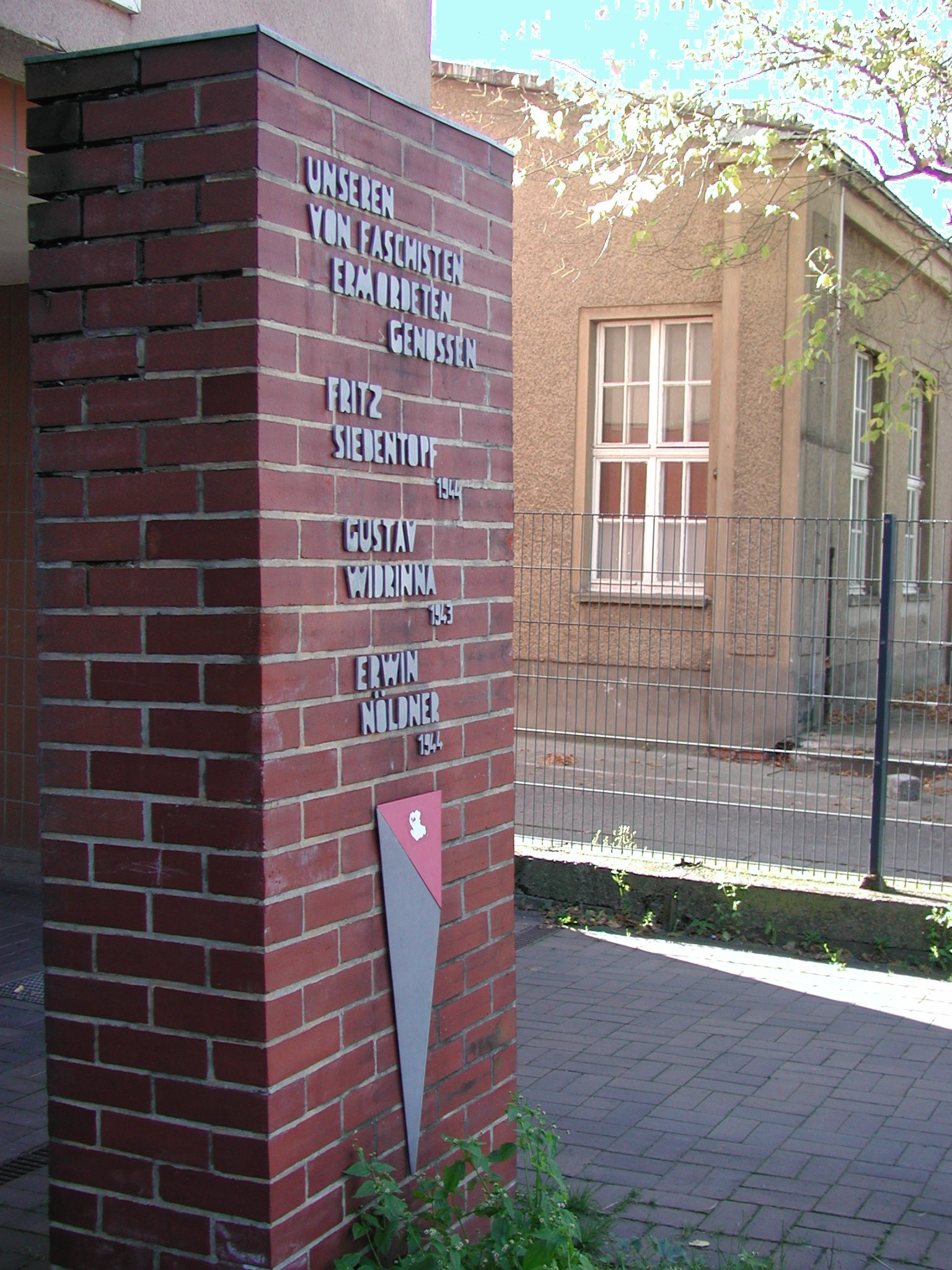 Gedenkstele für 3 ermordete Antifaschisten in Berlin-Weißensee